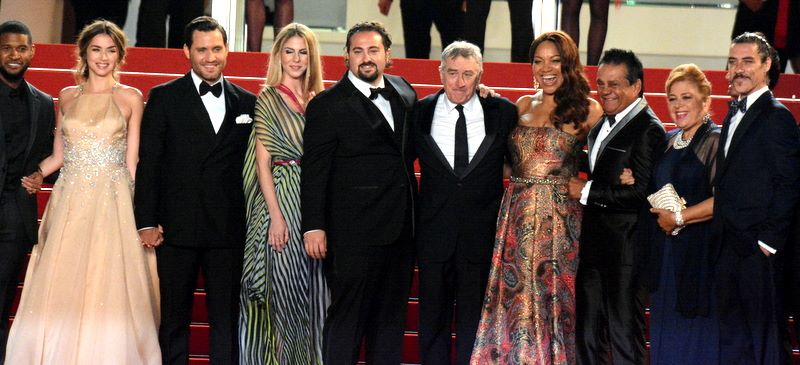 Présentation du film "Hands of stone" au festival de Cannes